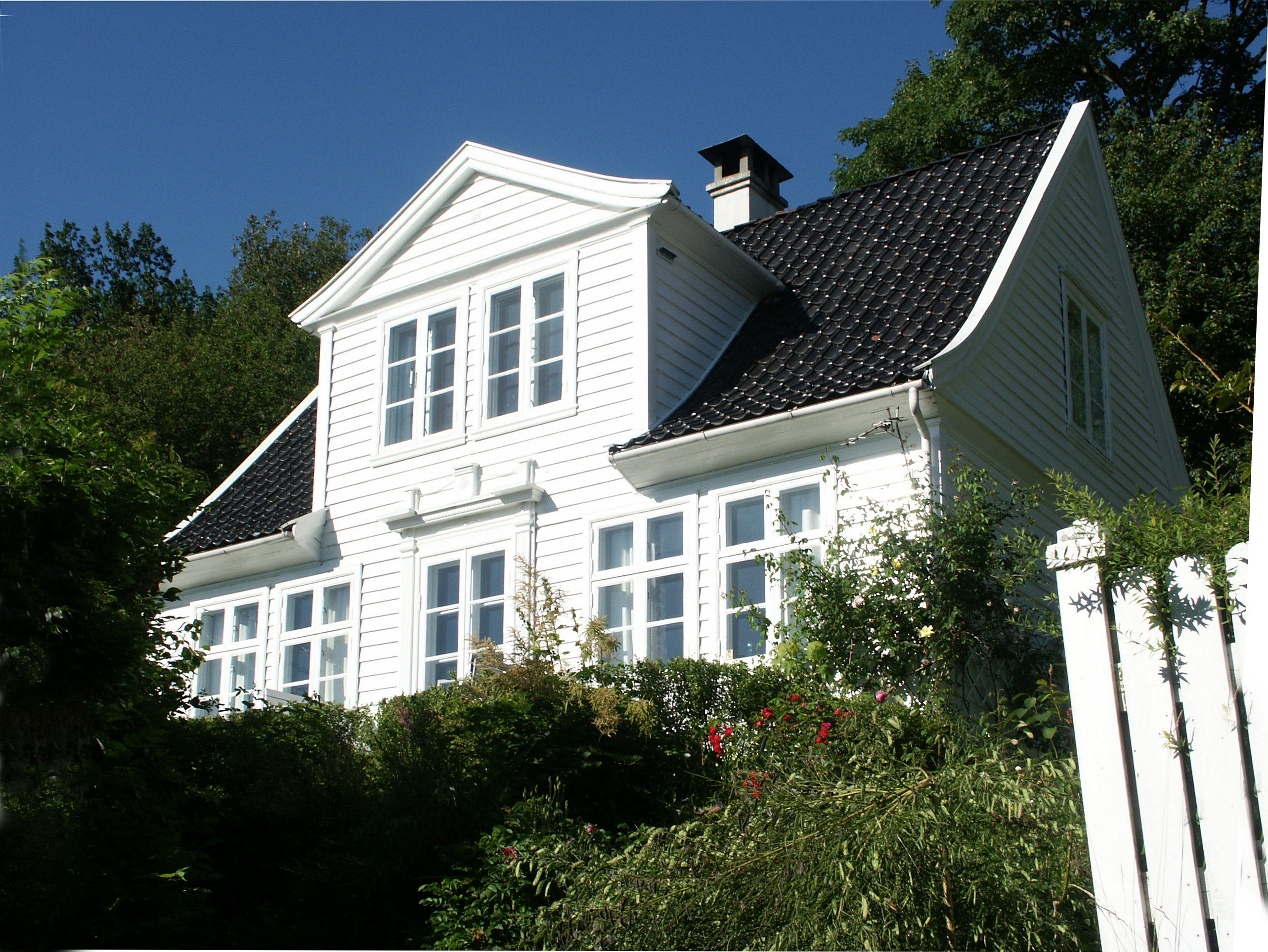 Architect Per Grieg's Own house, Årstadgeilen, Bergen, Norway